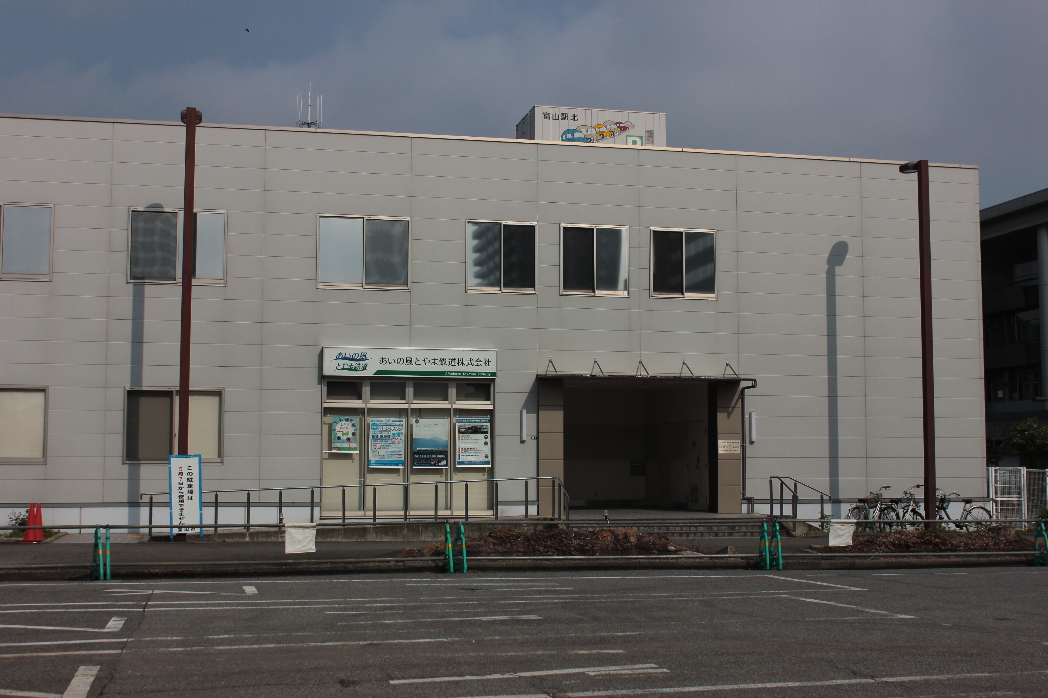 あいの風とやま鉄道本社（富山県富山市） Canon EOS Kiss X5